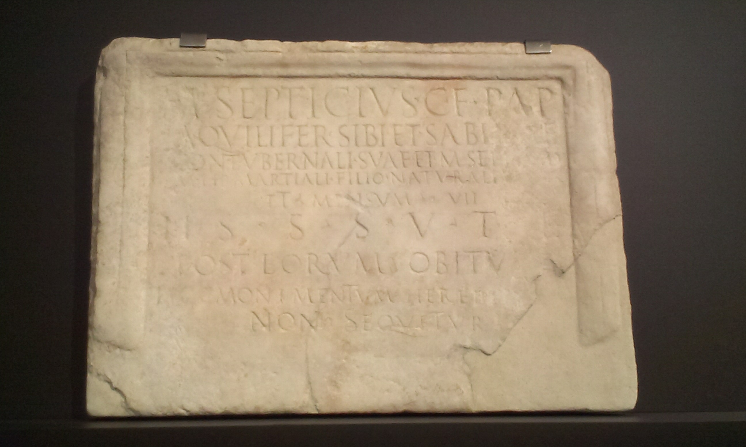 Museo Arqueológico y Etnológico de Córdoba (España). M(arcus) Septicius C(ai) f(ilius) Pap(iria) / aquilifer sibi et Sabi[n]ae / contubernali suae et M(arco) Septicio / M(arci) lib(erto) Martiali filio naturali an(norum) X / et mensum(!) VII / h(ic) s(iti) s(unt) s(it) v(obis) t(erra) l(evis) / post eorum obitum / hoc monimentum herede[m] / non sequetur CIL II2/7, 288